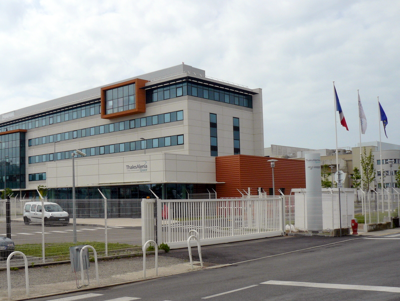 Entrée du siège de la holding de Thales Alenia Space et établissement de Cannes de Thales Alenia Space France, à partir de mars 2013